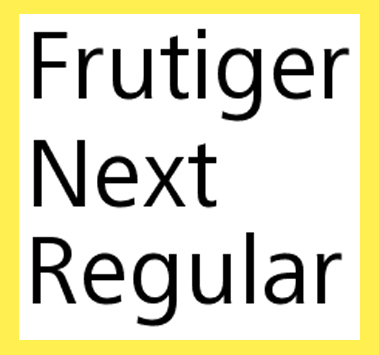 Mostra de Frutiger Next Regular